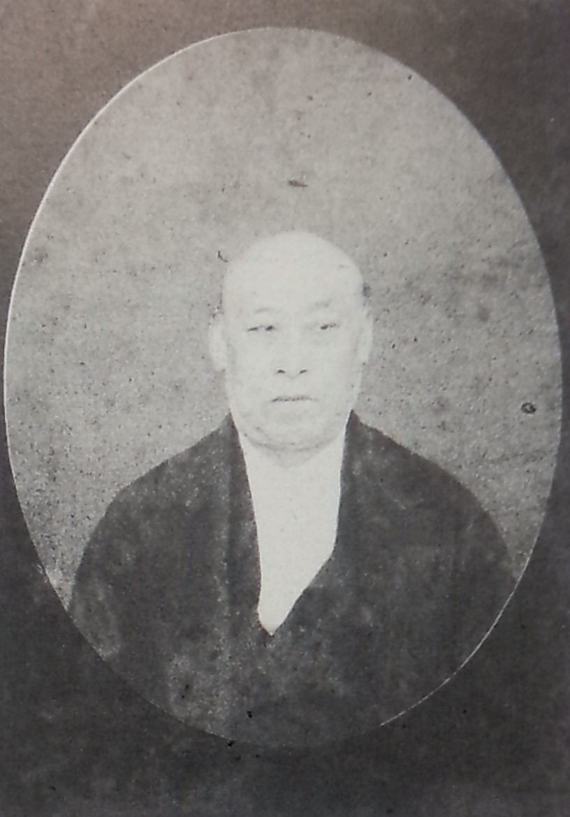 清水谷公正の肖像写真。